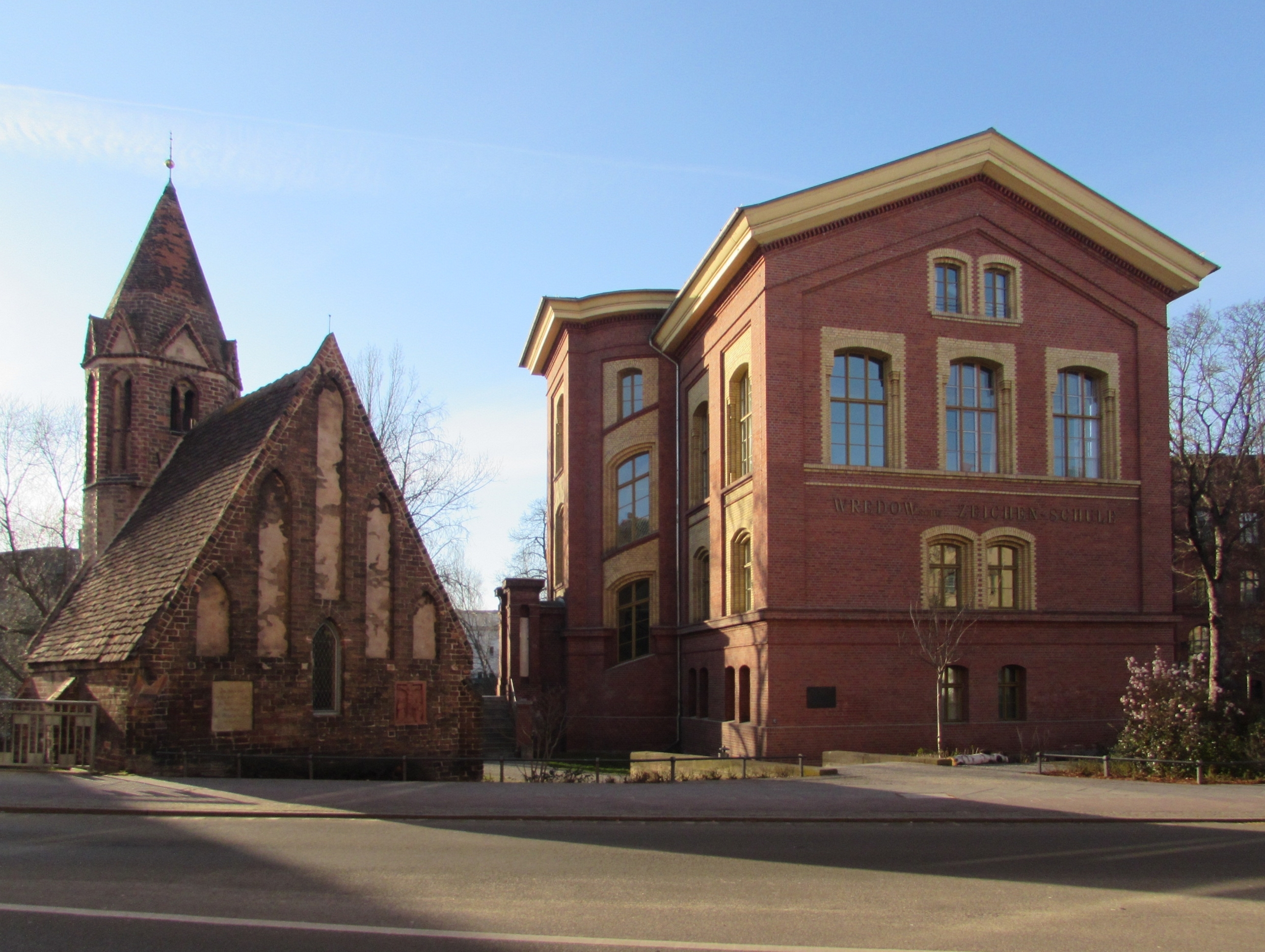 wredowsche zeichenschule und jakobskapelle, wredowplatz/jacobstraße